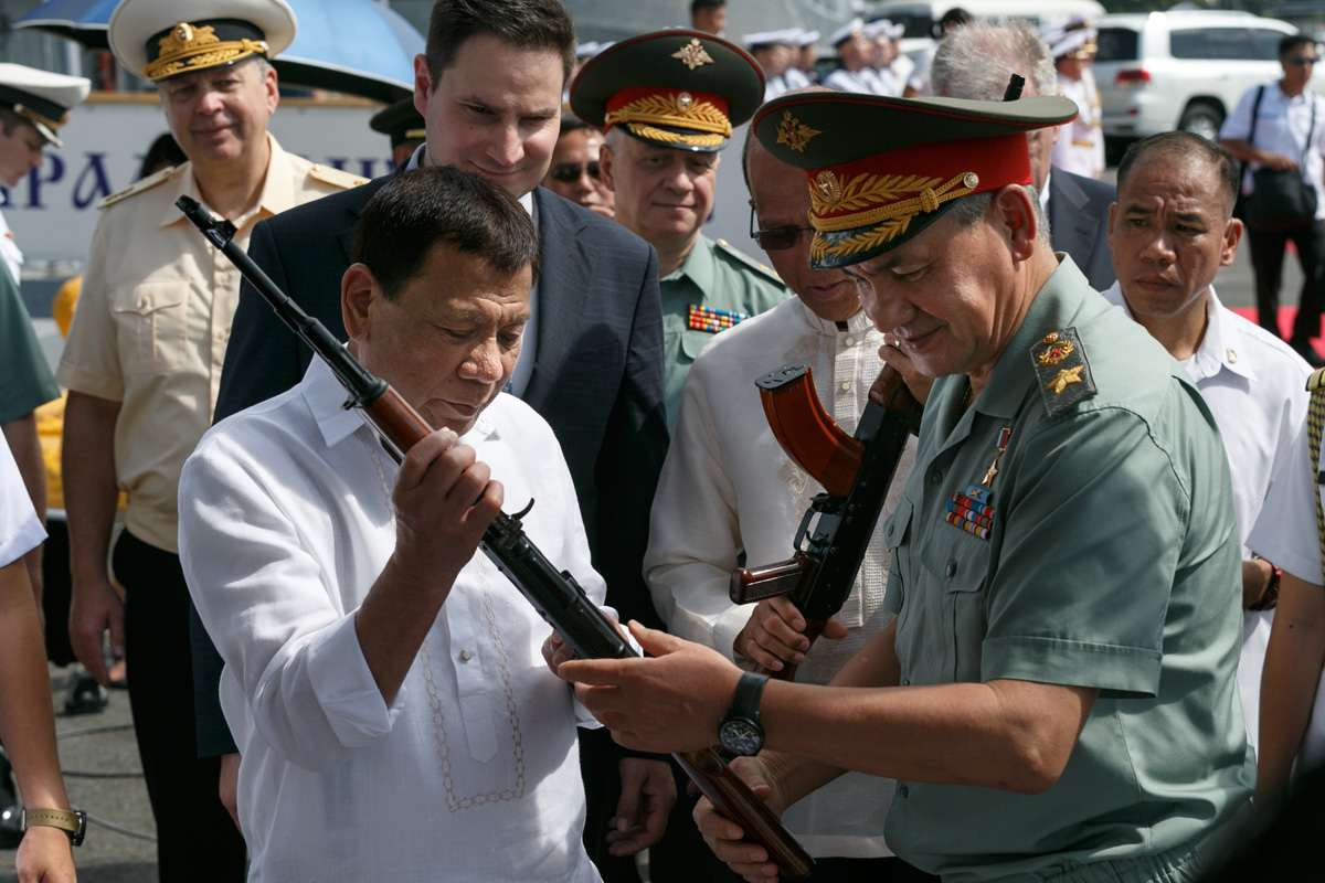 Церемония передачи филиппинской стороне партии российской продукции военного назначения с участием Президента Филиппин Родриго Дутерте и Министра обороны России генерала армии Сергея Шойгу. Филиппины, порт Манилы, борту БПК «Адмирал Пантелеев»